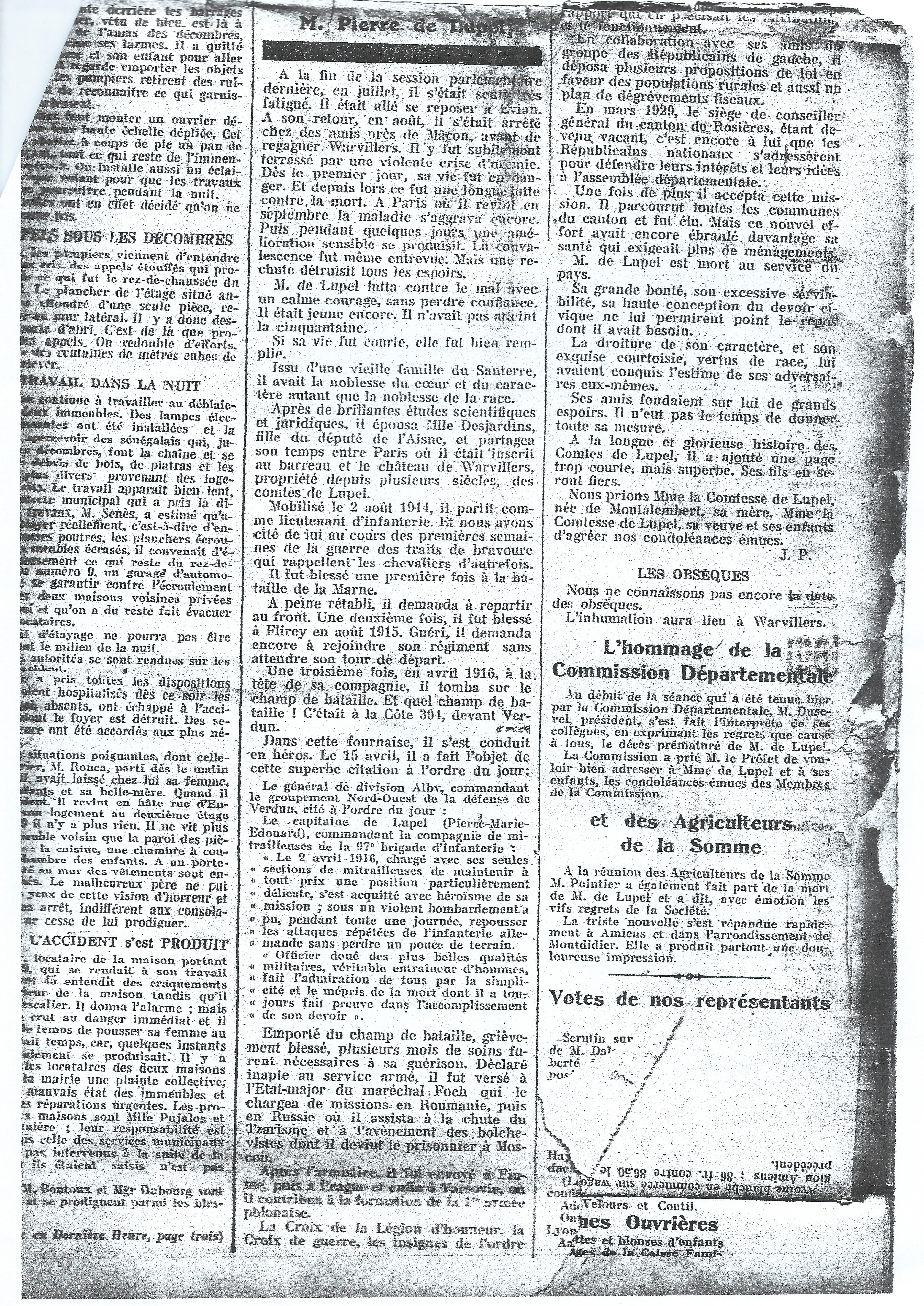 Article (page 2) du "Journal d'Amiens" après le décès de Pierre de Lupel, Député de Montdidier et Secrétaire de la Chambre